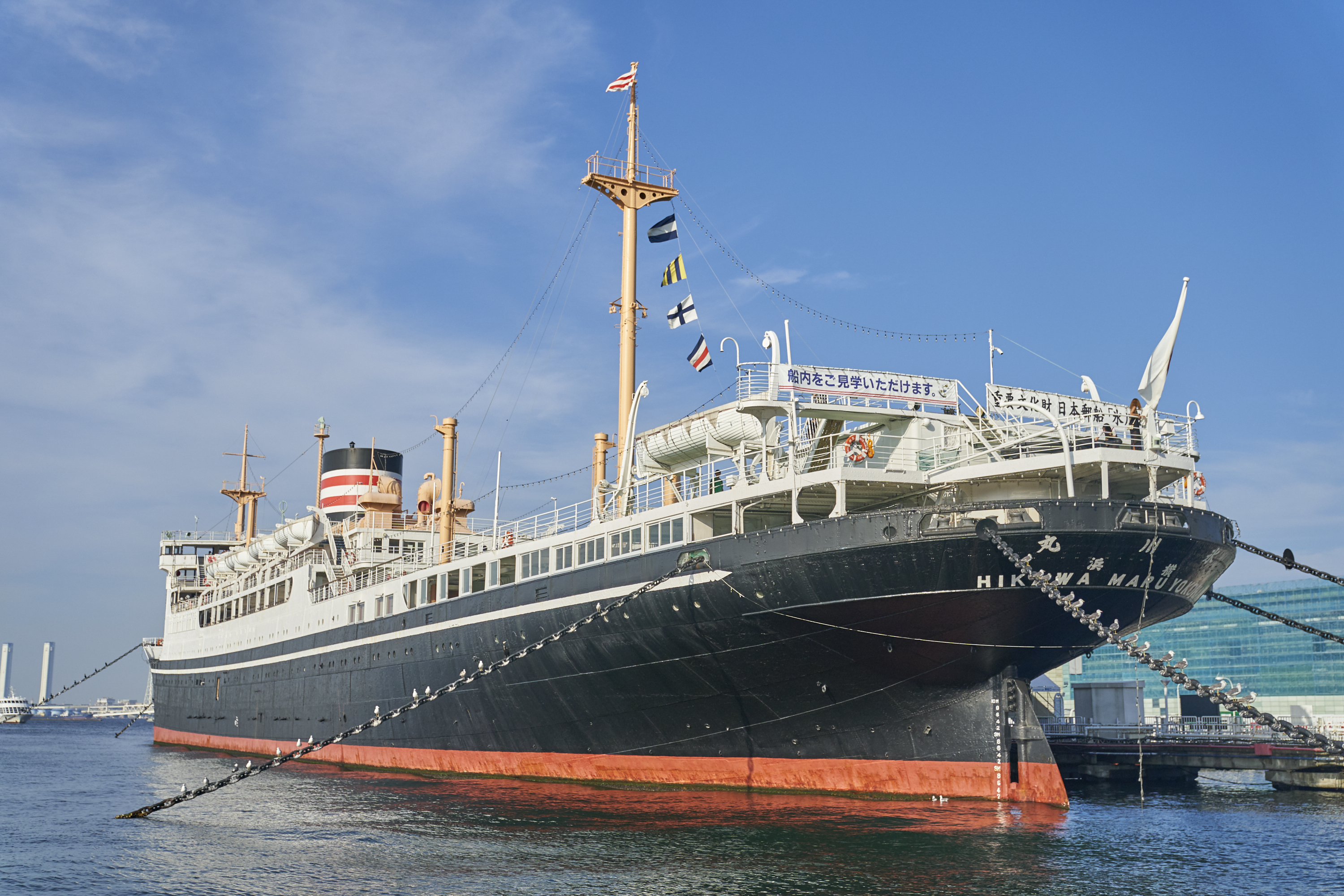 日本山下公園冰川丸號